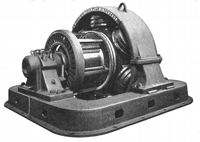 Gleichstromgenerator 1000 PS für die Stromversrogung der Martigny-Chatelard-Bahn